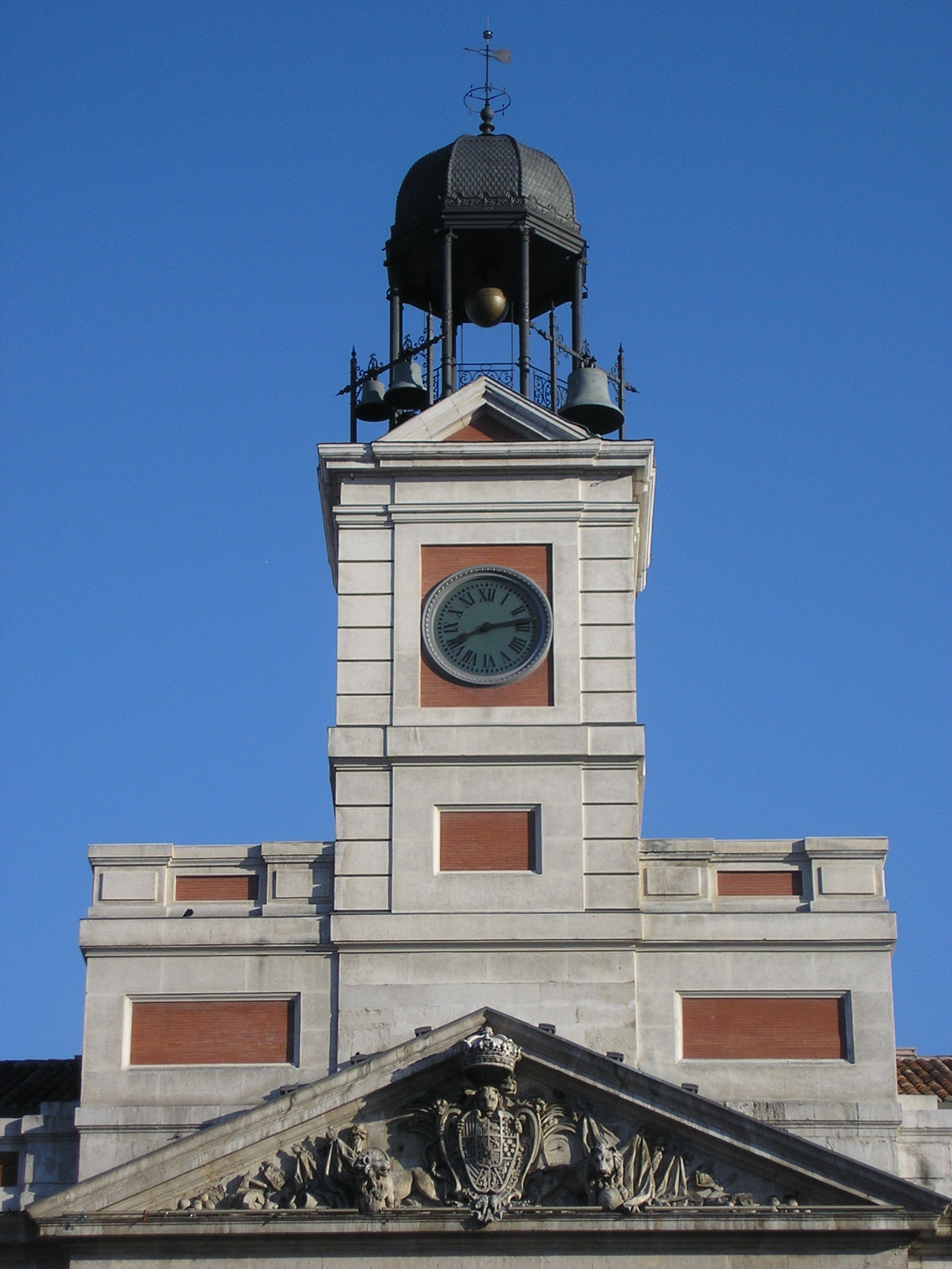 Reloj del Real Palacio de Correos, sede del Gobierno de la Comunidad de Madrid, es el que da la bienvenida al año nuevo en España.